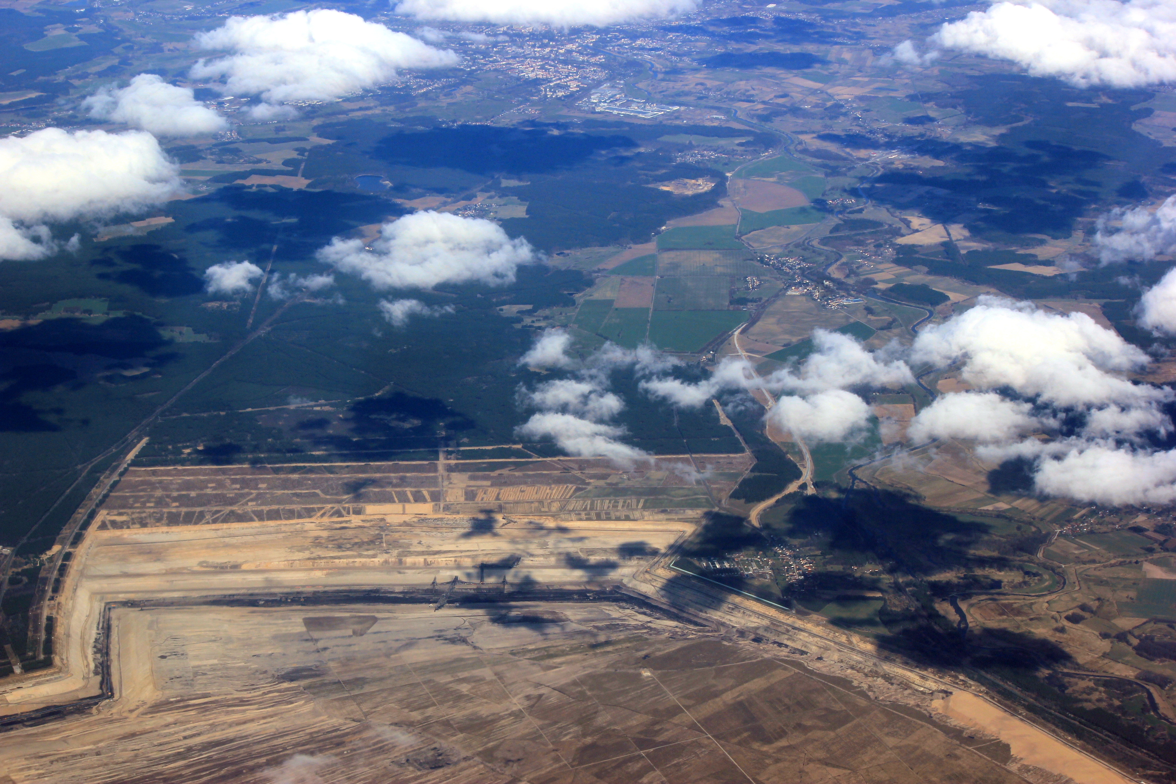 Luftbild des Tagebaus Jänschwalde in der Niederlausitz.